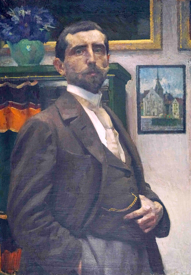 Selbstbildnis